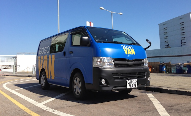 全身貼Gogovan